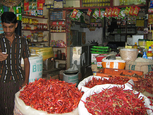 Taliparamba, Kerala, India.